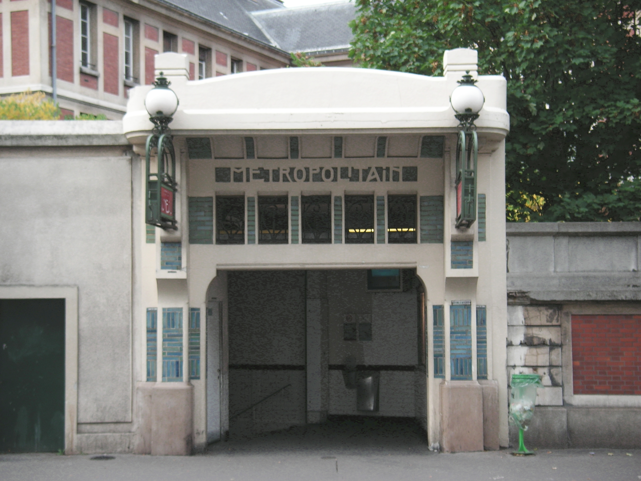 Vaneau Paris metro station